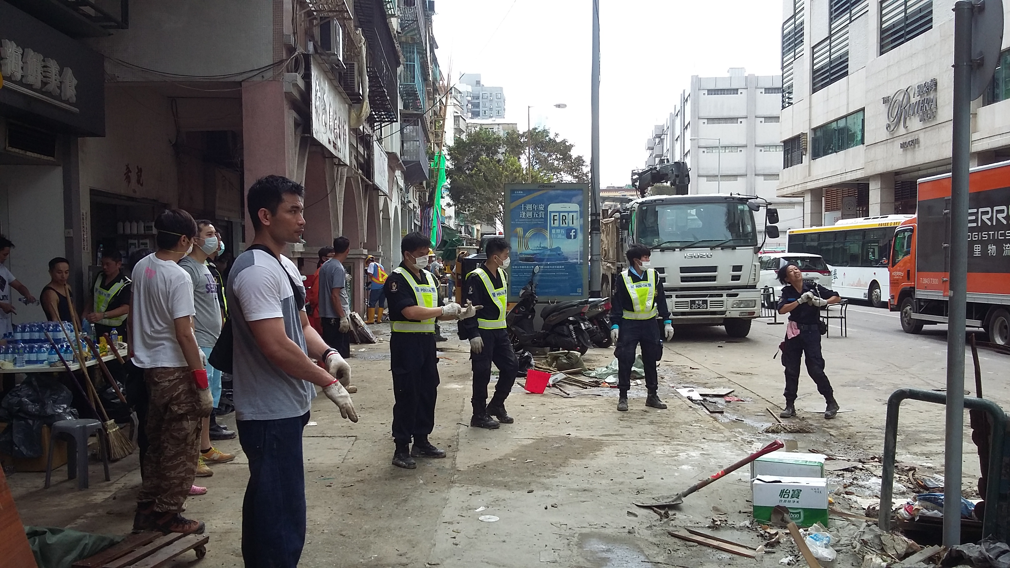 風暴過後第二日，風順堂區情況。